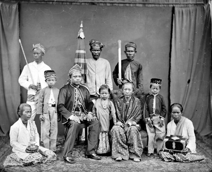 Negatief. Portret van de ronggo van Banjarmasin met vrouw en kinderen